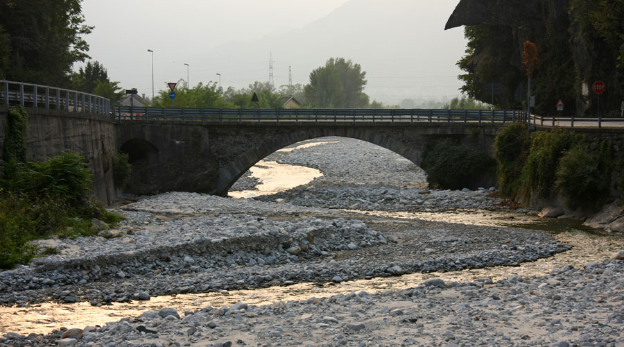 Il torrente Melezzo Occidentale presso Masera (VB), all'uscita dalla Val Vigezzo